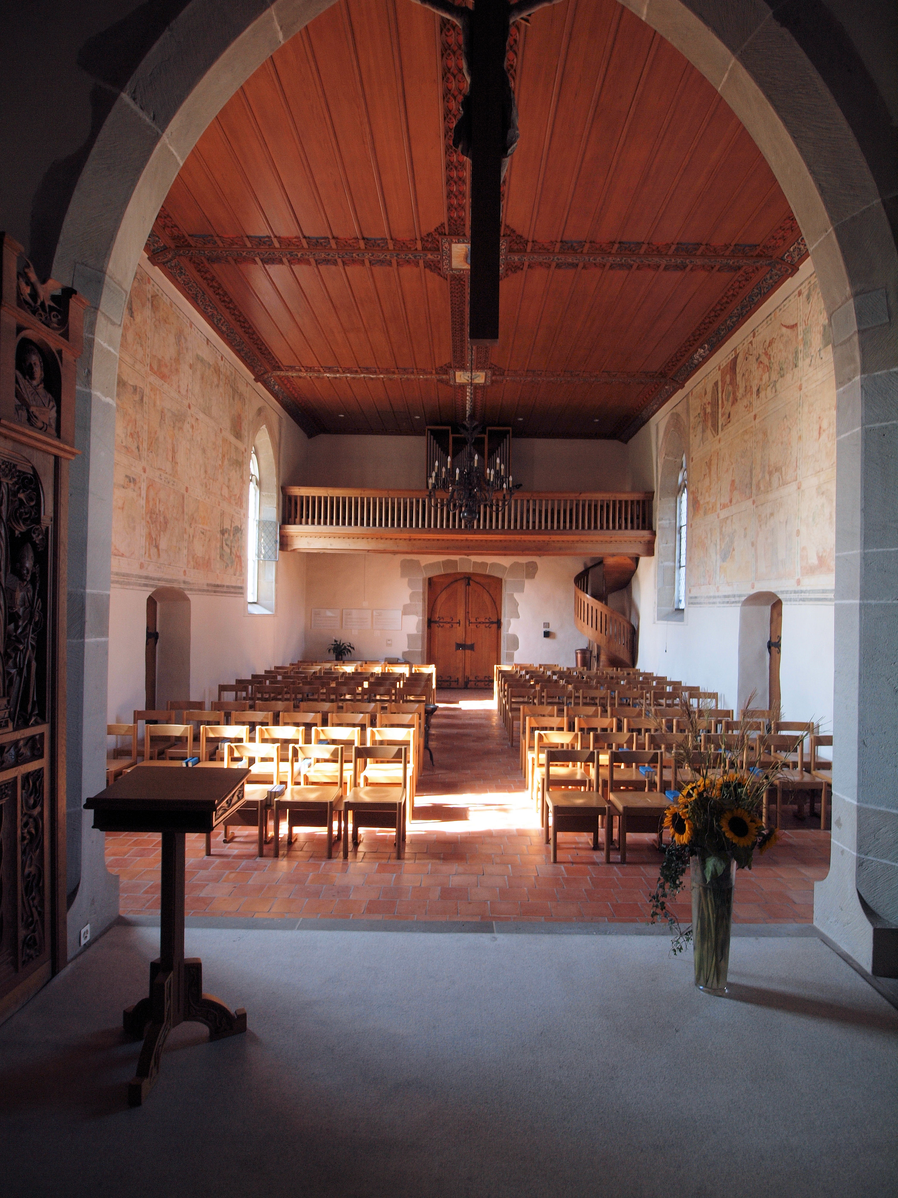 Der Innenraum der Kirche St. Wolfgang in Hünnenerg ZG. Sicht vom Chor in Richtung Schiff (Richtung Westen)